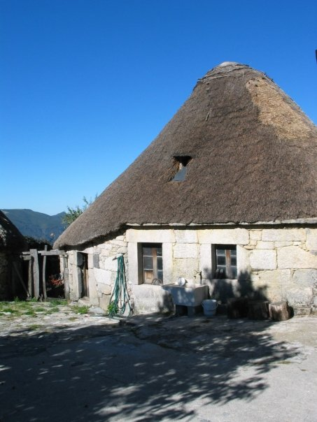 Palloza en Piornedo, Donís, Cervantes,Lugo, Galiza